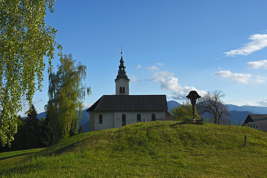 Sv. Križ nad Kališem, krajevna skupnost Selca.